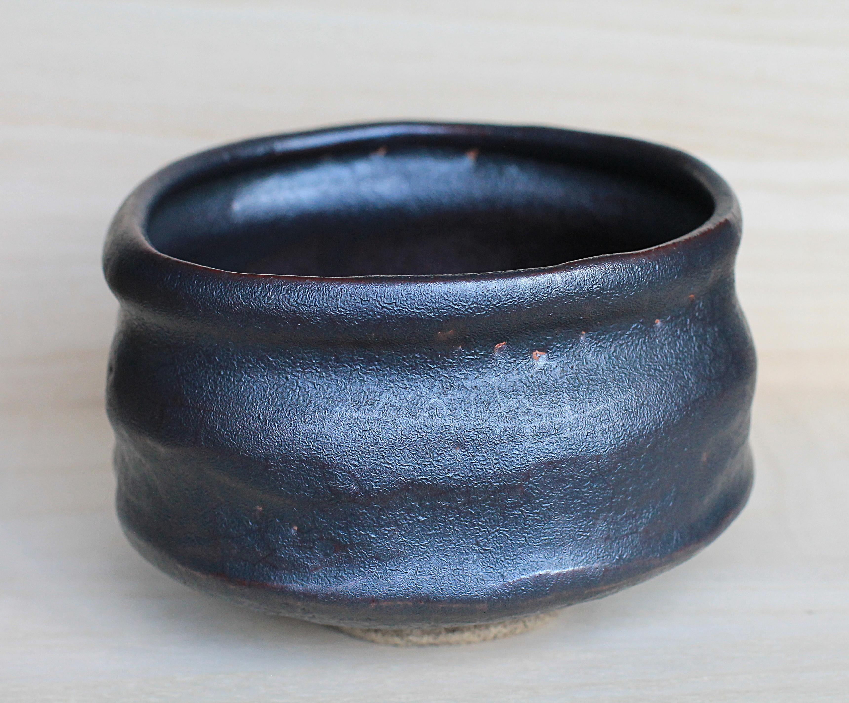 Oribeguro, schwarze Glasur ohne Dekor, „Schuhform“, kutsugata, Japan ca. 1620.